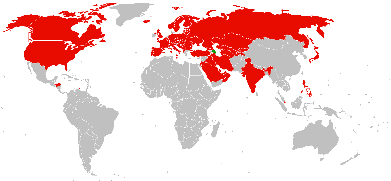 Все соперники сборной Азербайджана по футболу